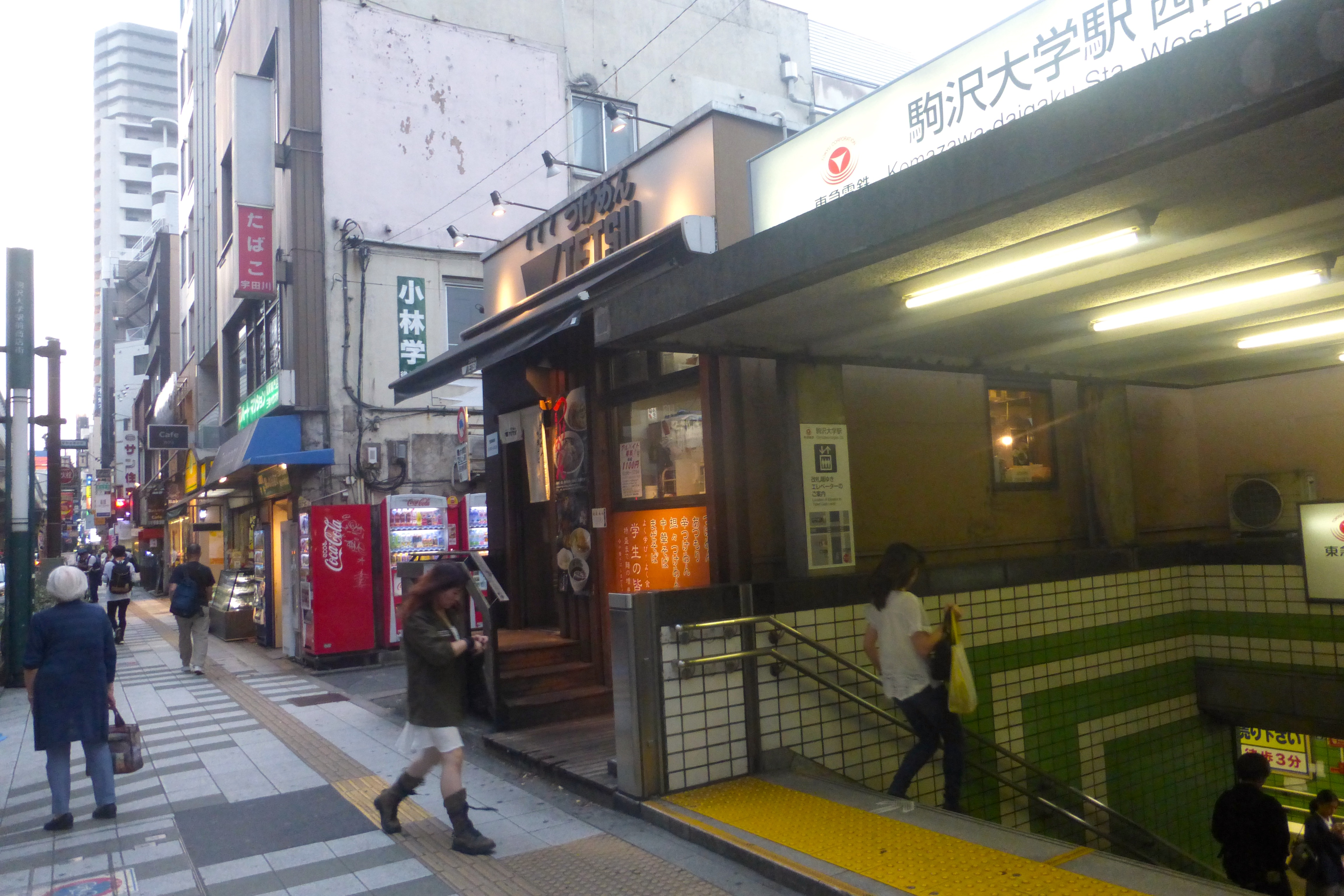 Komazawa-daigaku Station west exit (駒沢大学駅の西口)